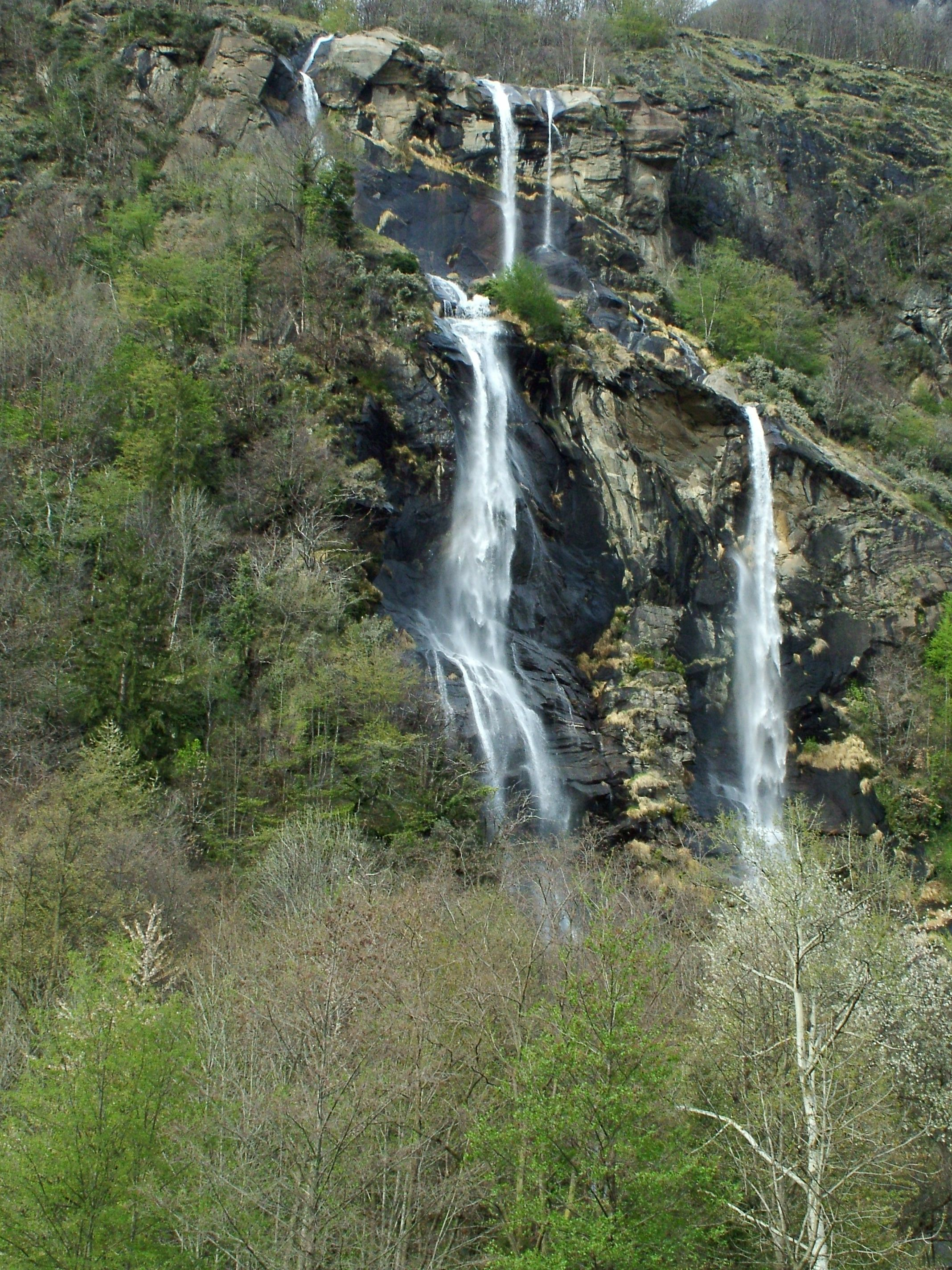 Maloja-hágónál út menti vízesések egyike, Chiavenna, Olaszország